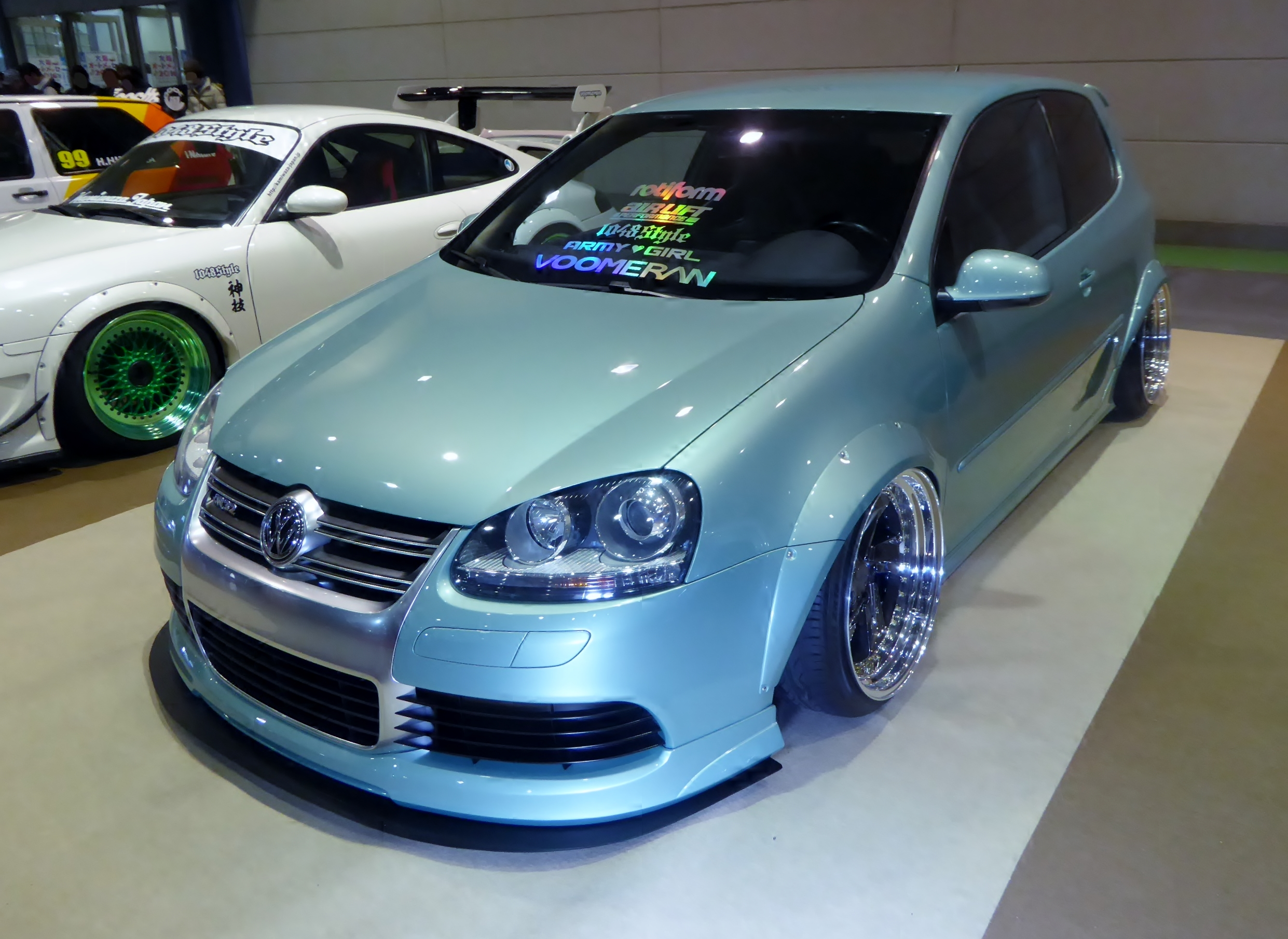 大阪オートメッセ2016においてeuromagic/voomeran GOLF5 R32を撮影。